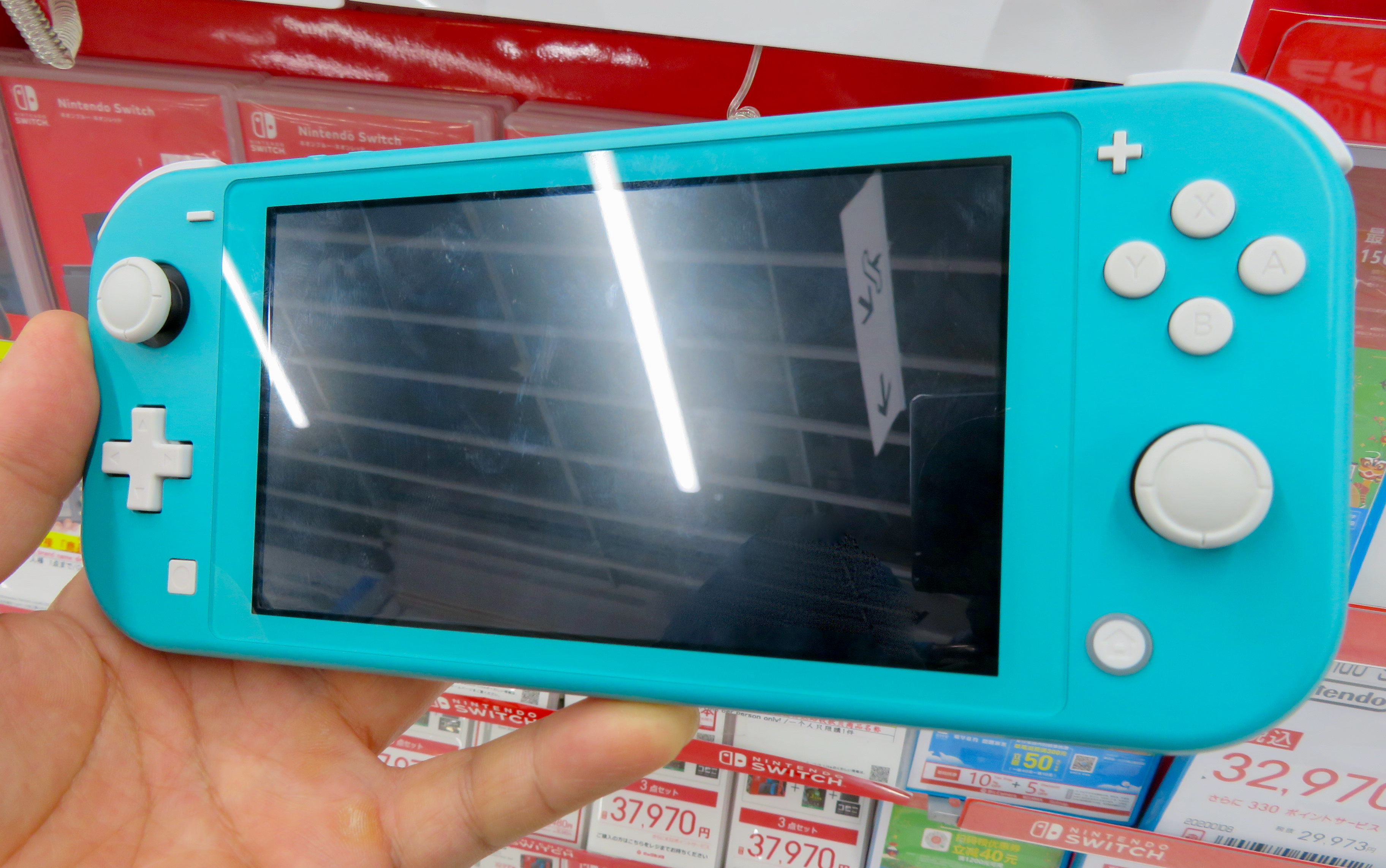 任天堂の携帯ゲーム機「Nintendo Switch Lite」（ターコイズ色モデル）。